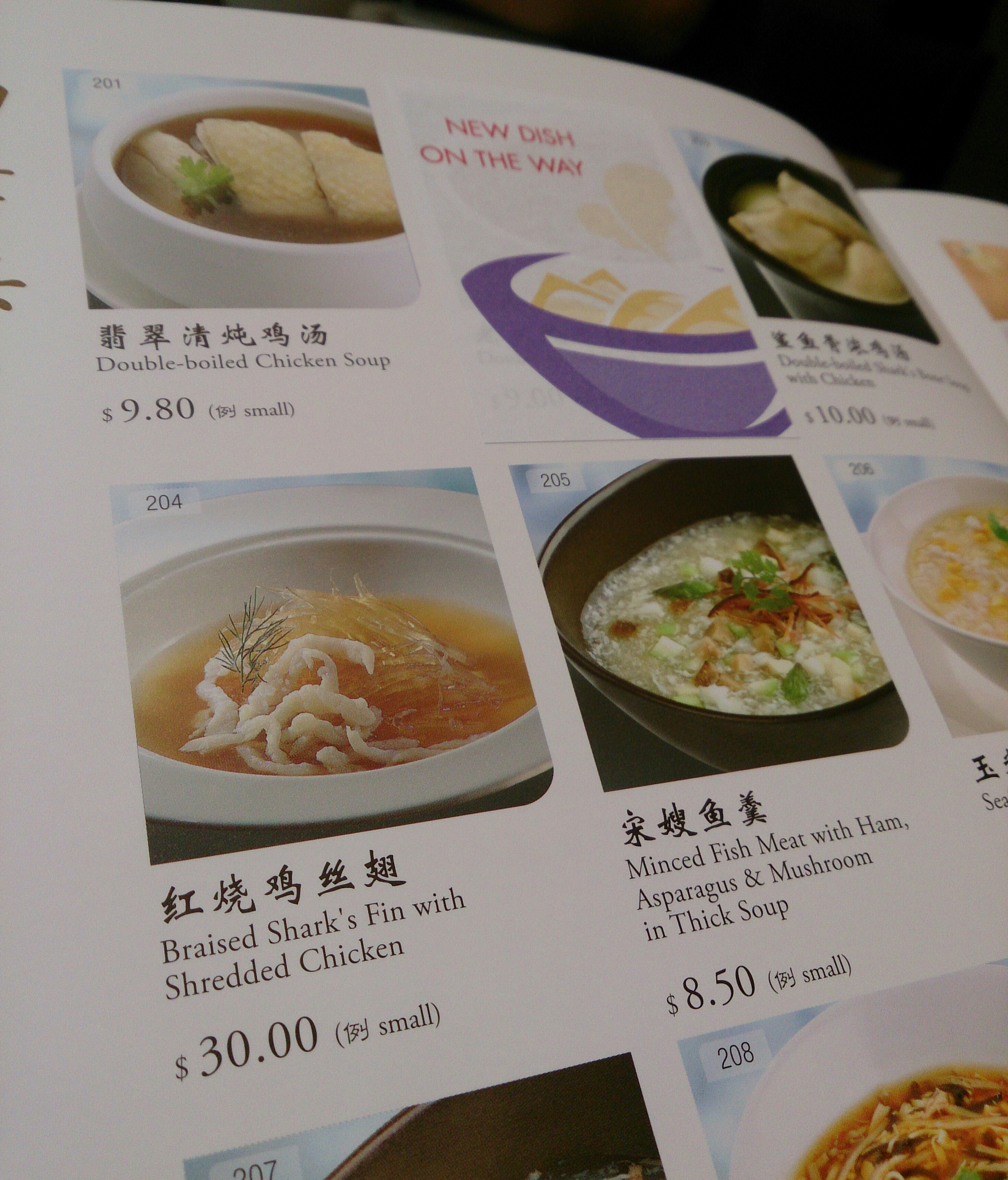 controversial dish